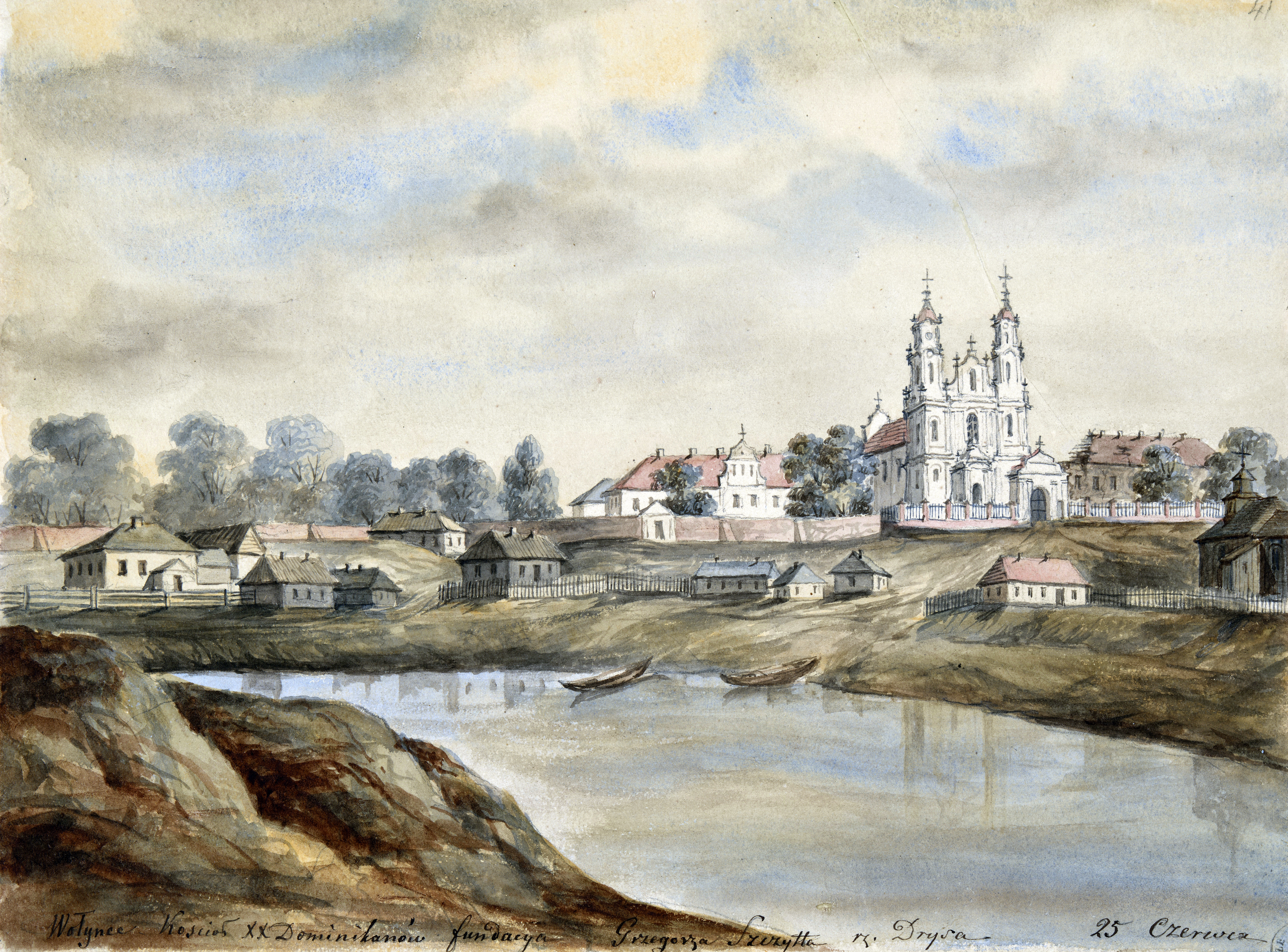 Беларуская (тарашкевіца): Валынцы (Vałyncy) з боку ракі Дрысы (Drysa). Касьцёл Сьвятога Юрыя і кляштар дамініканаў